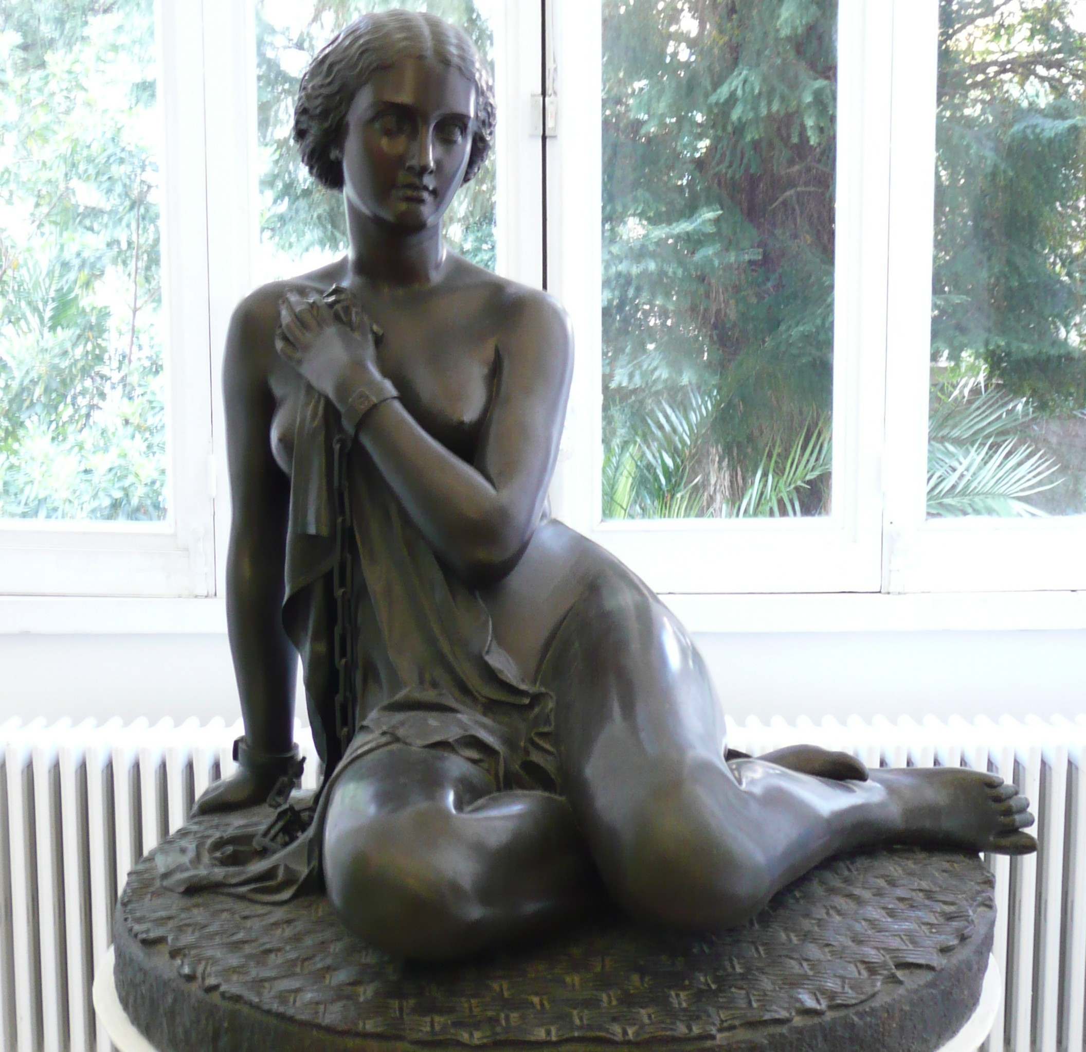 Au musée des Beaux-Arts Jules Chéret de Nice (Alpes-Maritimes), bronze d'Antonio Giovanni Lanzirotti de 1858 représentant une esclave grecque.